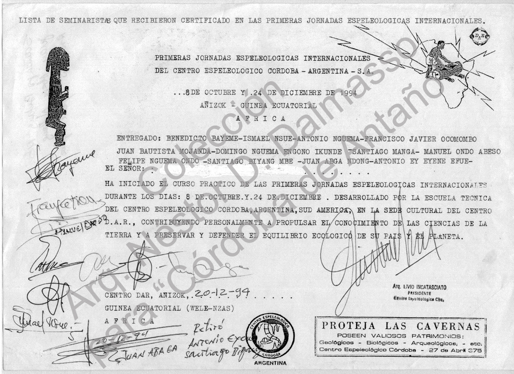 Livio Incatasciato 19 Añizok-1P